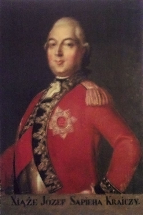 Беларуская (тарашкевіца): Партрэт Юзэфа Сапегі (Juzef Sapieha) гербу «Ліс» (1737—1792), дзяржаўнага дзеяча Вялікага Княства Літоўскага, крайчага вялікага літоўскага.